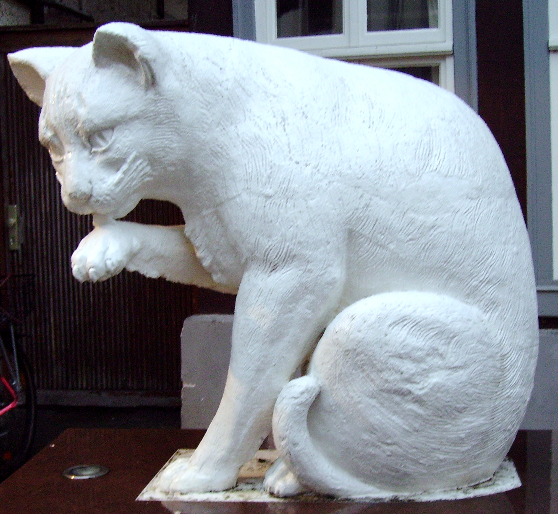 Hoffmanns Katze